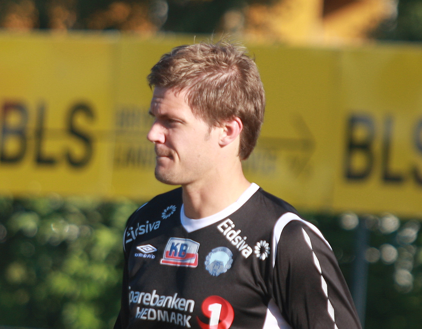 Kai Olav Ryen at Bryne stadion